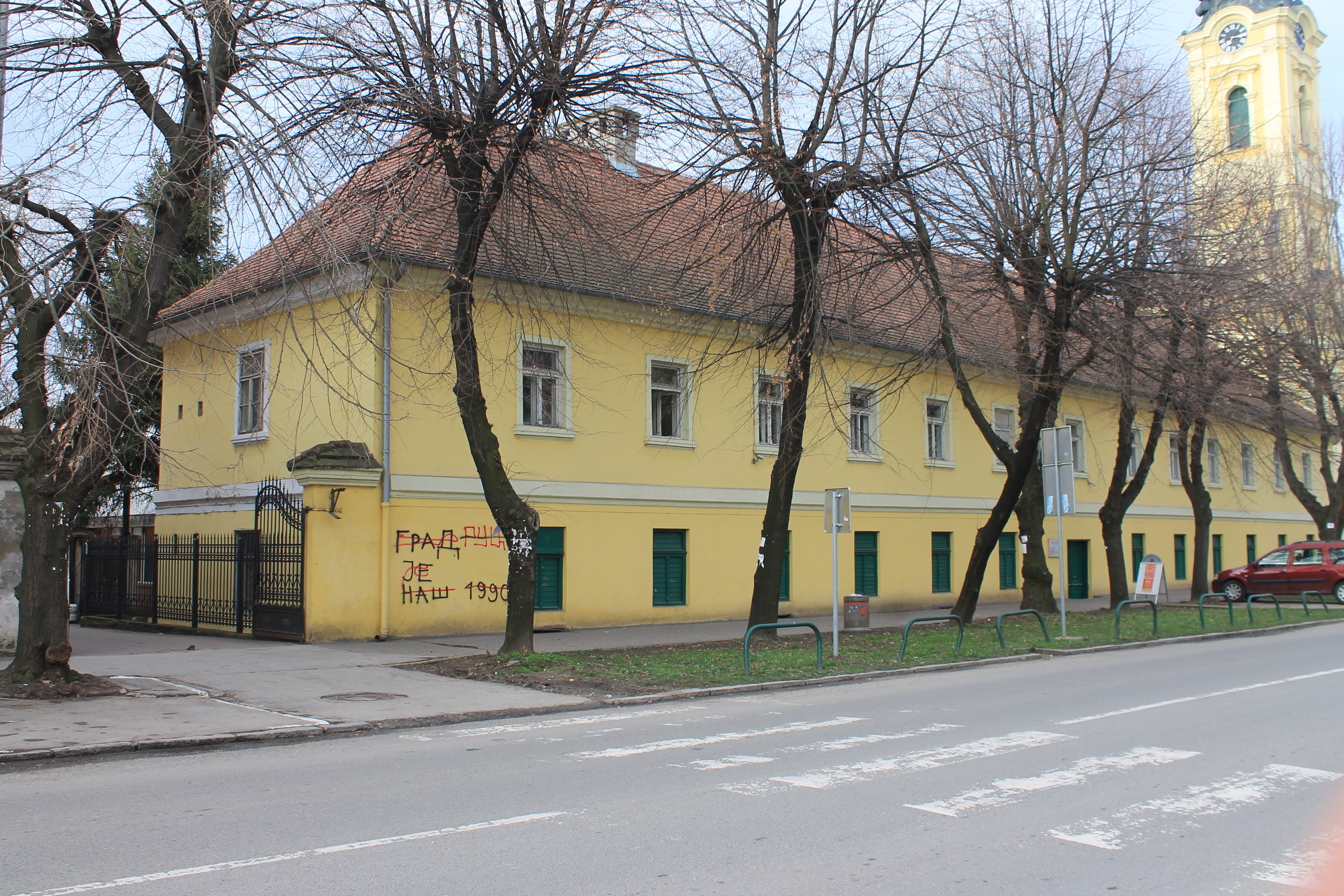 Zgrada muzeja, Ruma